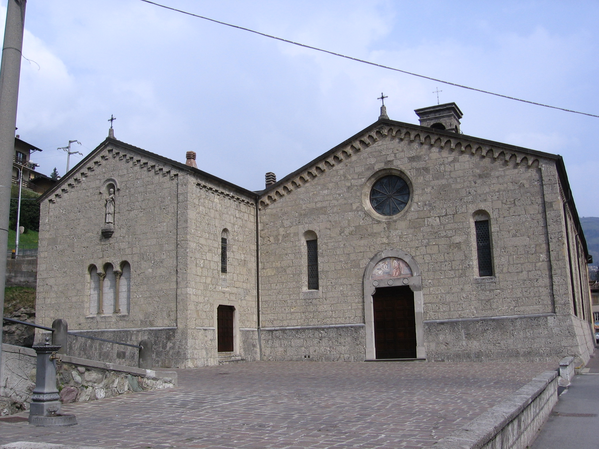 Ponte Nossa, Bergamo, Italia